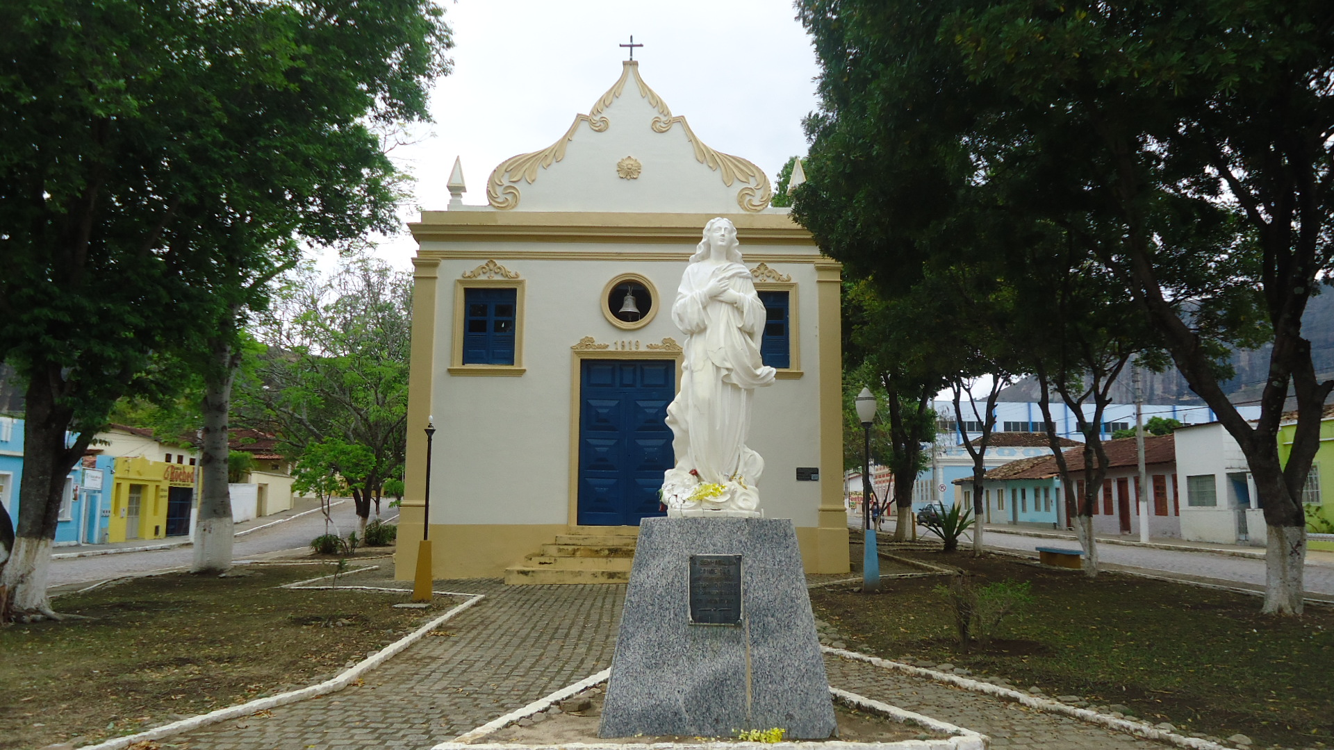 Igrejinha do Santuário foi construída em 1919 e se encontra no meio de uma praça de um conjunto arquitetônico tombado pelo patrimônio histórico denominado Centro Histórico de Pedra Azul